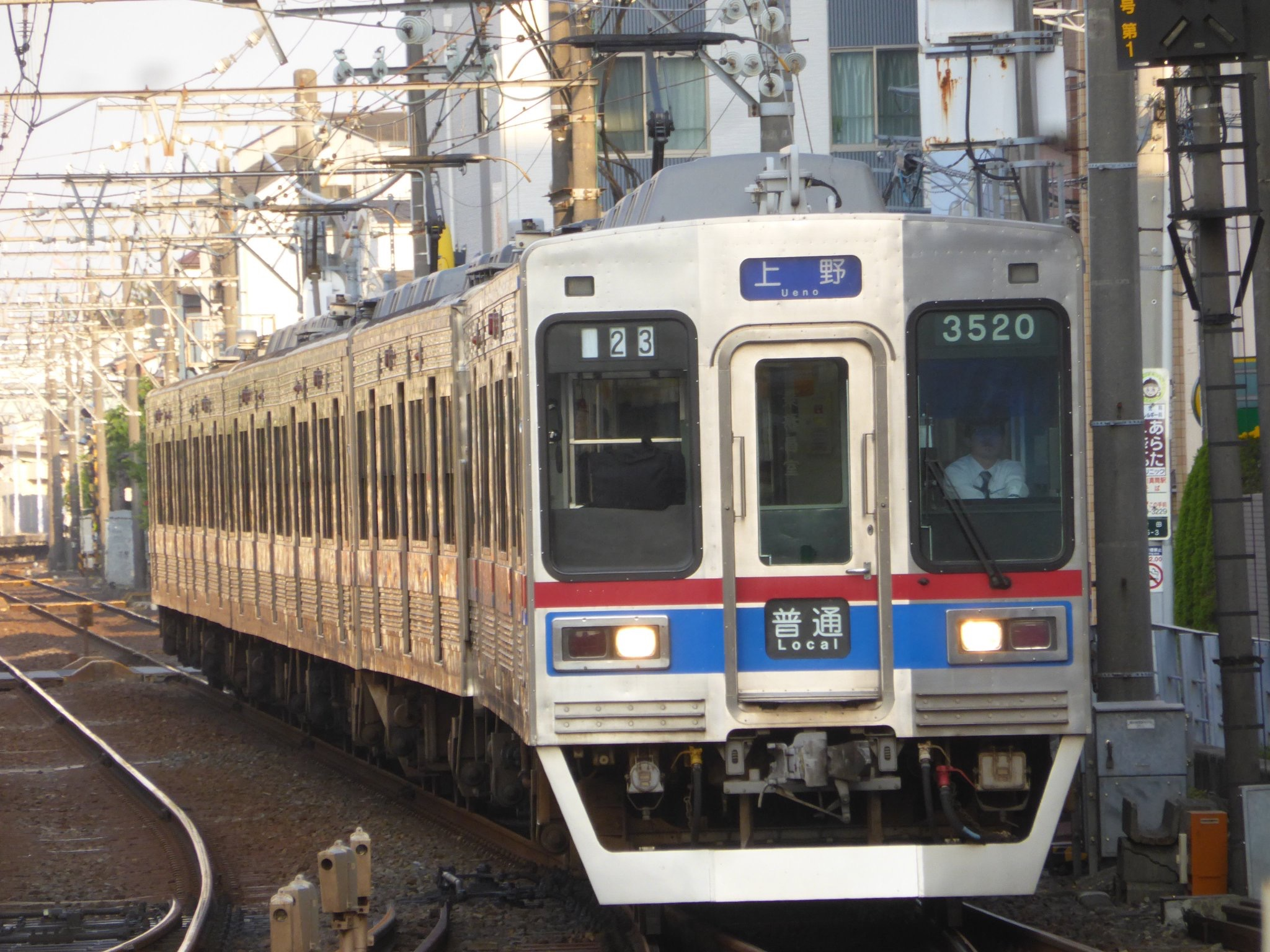 京成3500形3520編成 23運用 普通上野行